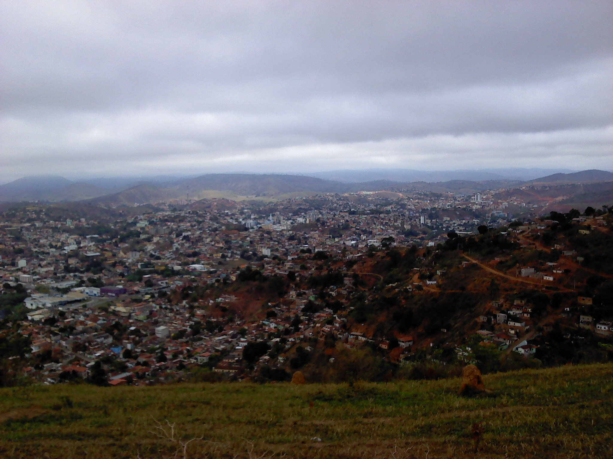 teófilo otoni - Minas Gerais - Brazil